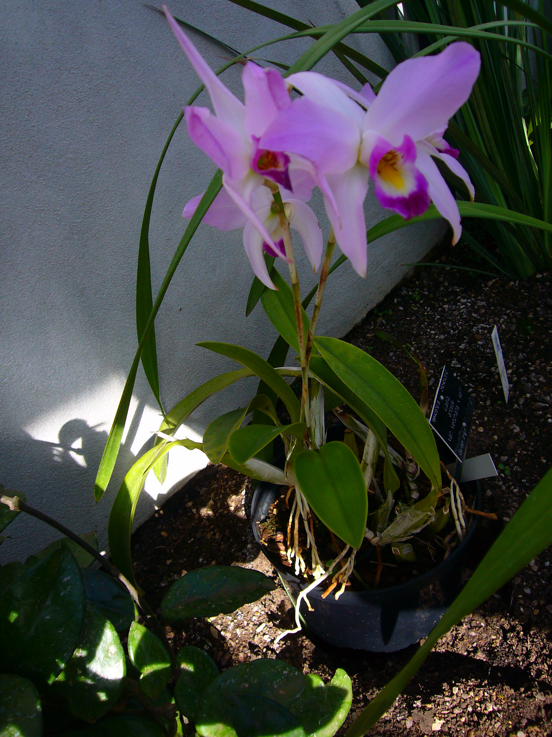 Laelia anceps var. veitchiana Rchb.f.